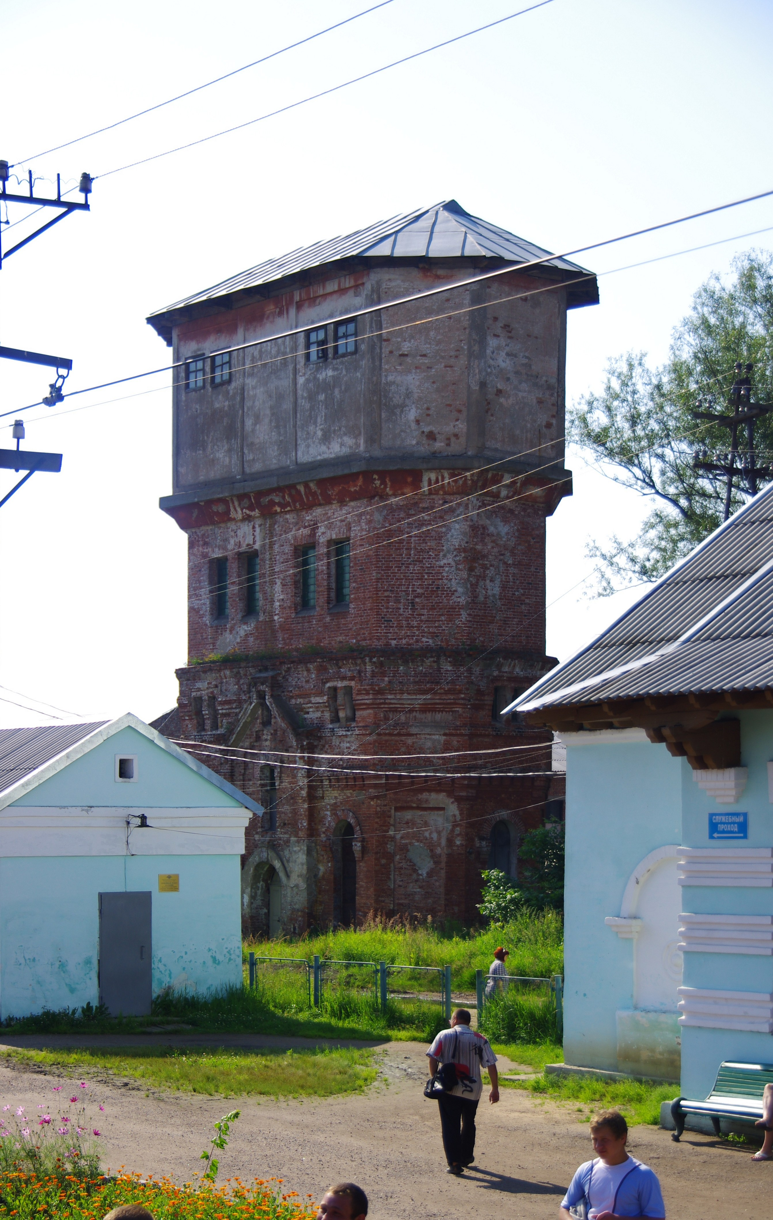 Zapadnaya Dvina, Tver Oblast, Russia